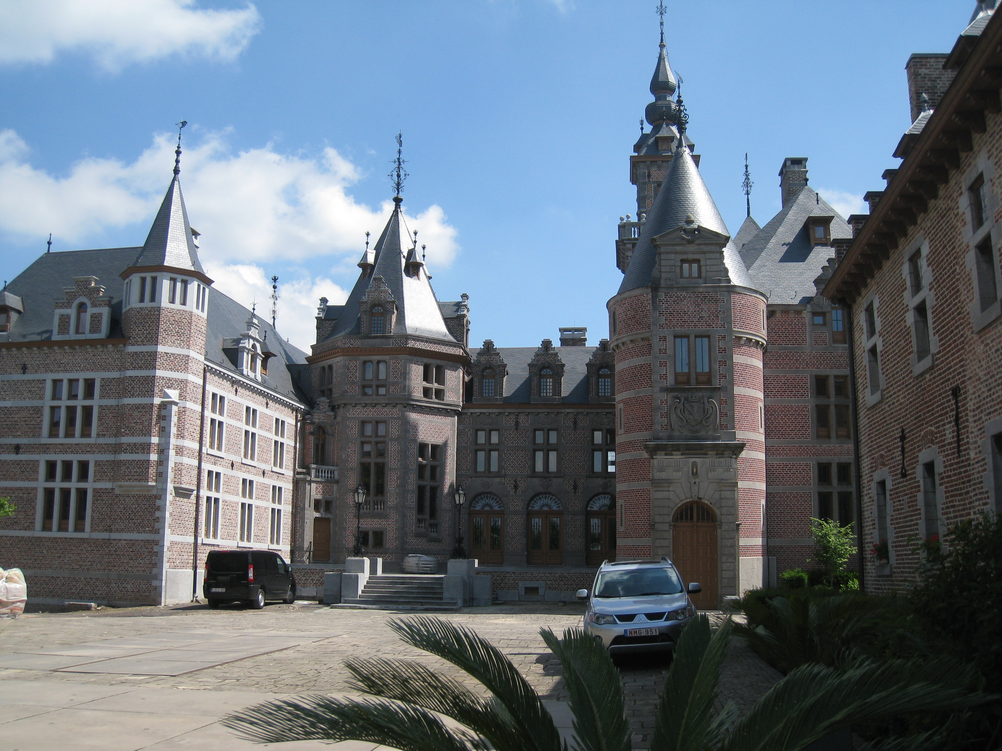 Kasteel van Ordingen, Sint-Truiden Gerestaureerde oostvleugel